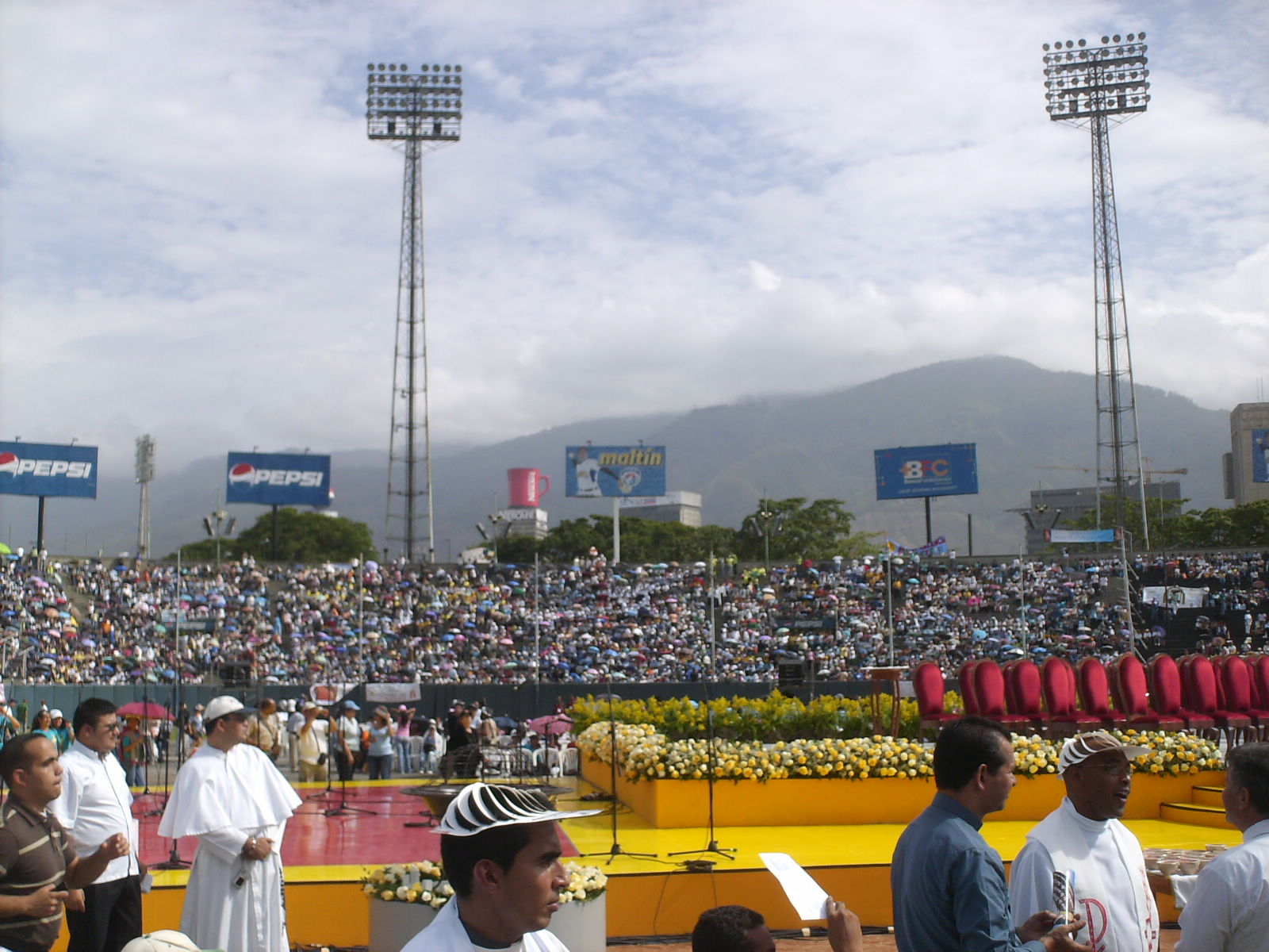 Beatificación de la Madre Candelaria de San José en el estadio de Béisbol de la Ciudad Universitaria de Caracas.